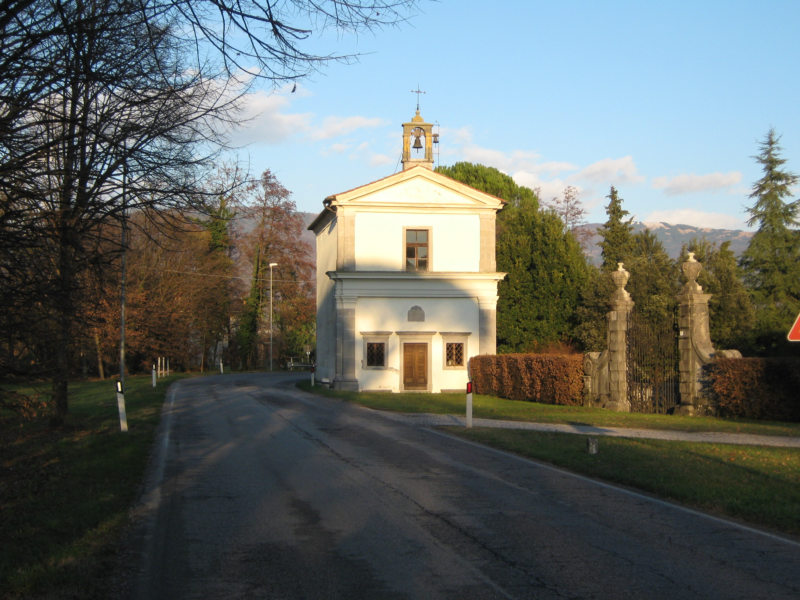 VILLA MANGILLI SCHUBERT XVII-XVIII